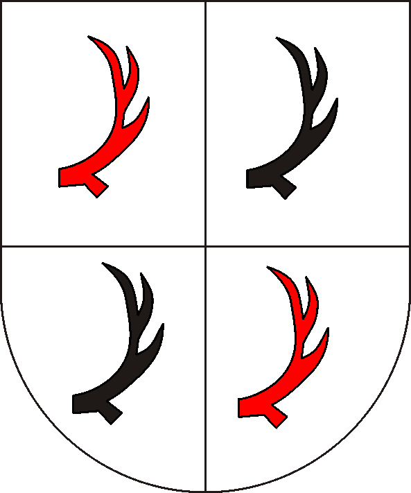 Wappen Blankenburg-Regenstein